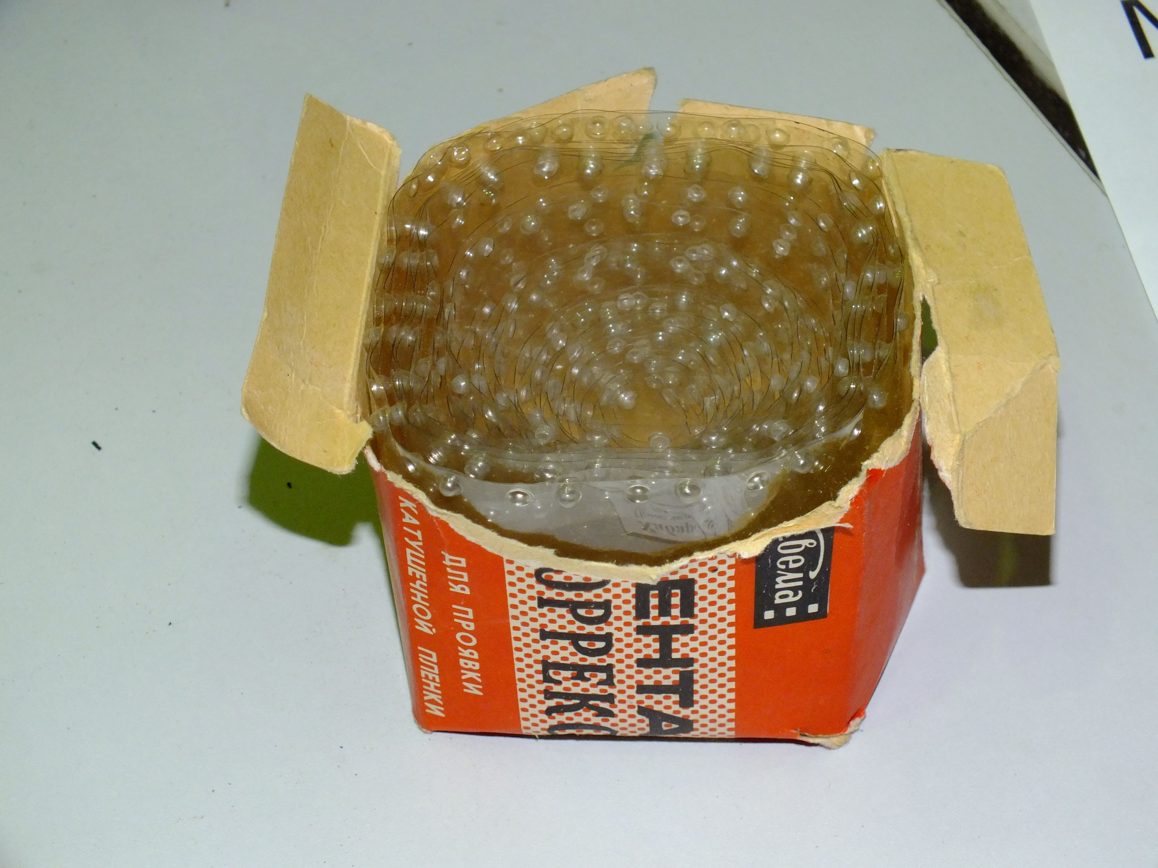 Лента Коррекс для широкой фотоплёнки